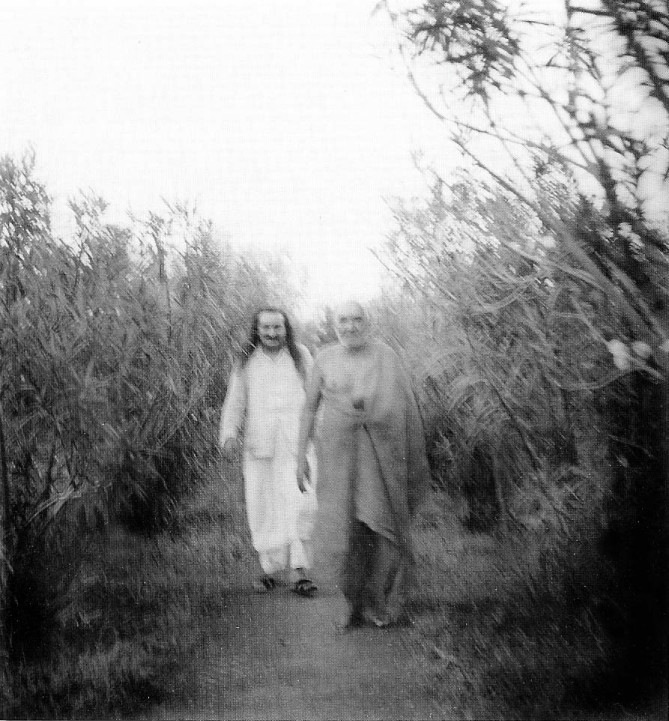 Upasni Maharaj and Meher Baba